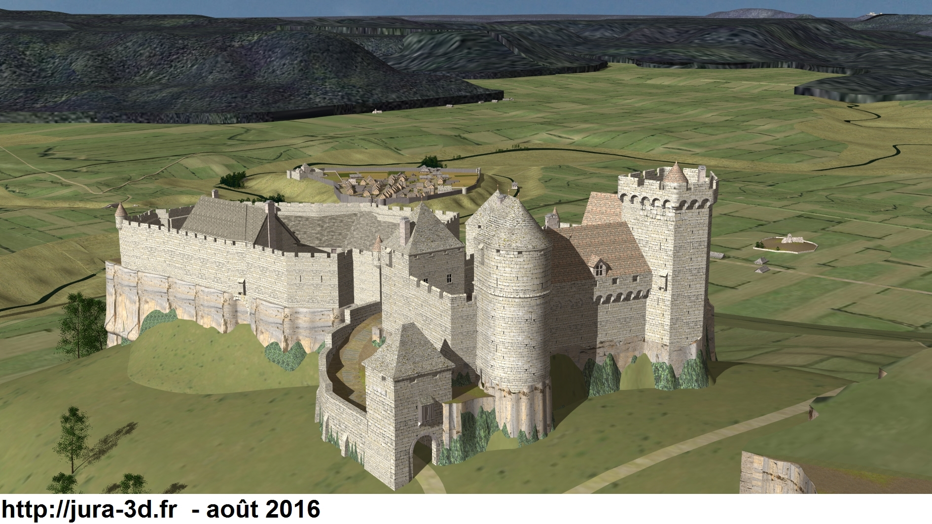 Restitution numérique 3D du château de Montrivel au XVe siècle. Proposition basée sur le relevé de 1992.